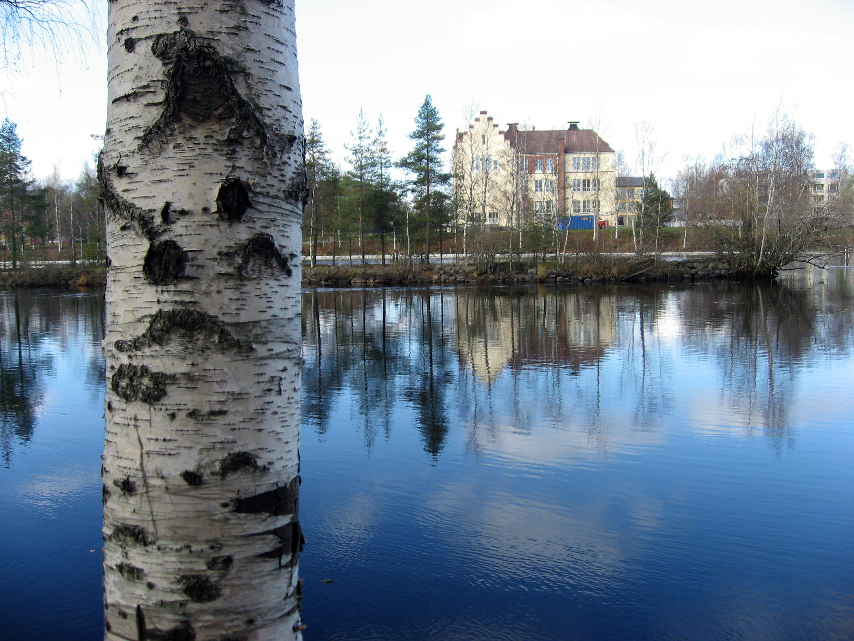 Kimmel park, Pielisjoki, Joensuu